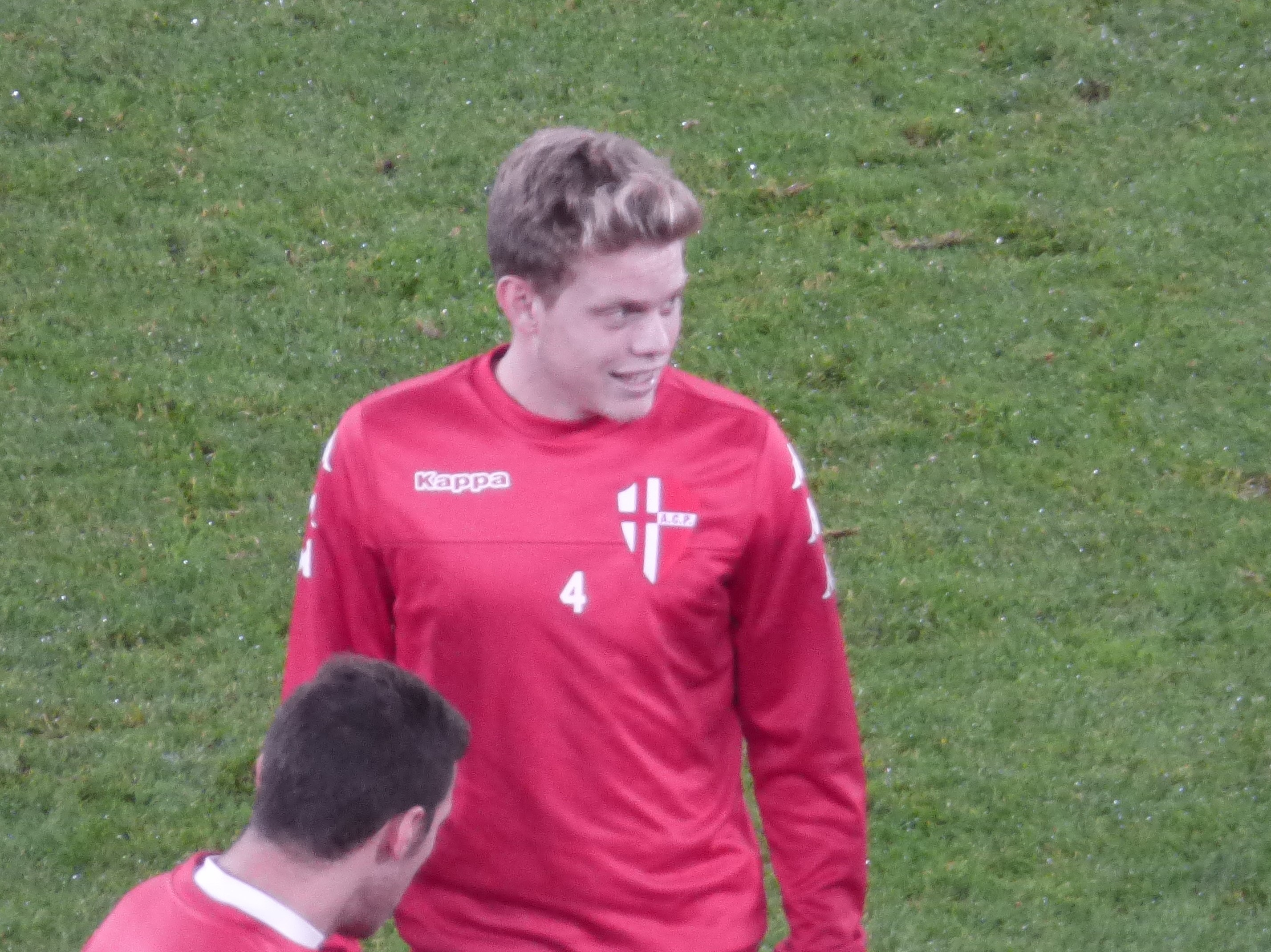 Riccardo Serena lors du match amical RC Lens - Calcio Padova, le 11 octobre 2018 au Stade Bollaert-Delelis de Lens.